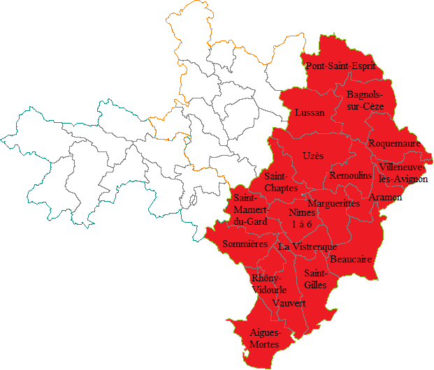 Carte des cantons composant l'arrondissement de Nîmes (Gard)